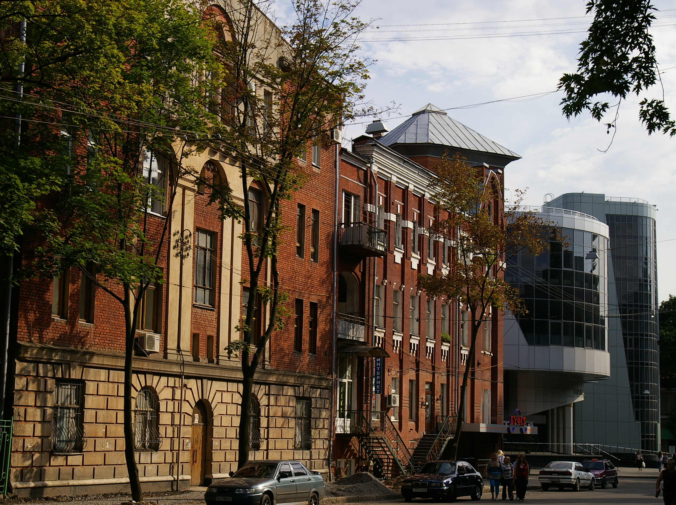 Харьков